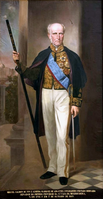 Retrato de Miguel Calmon du Pin e Almeida, Marquês de Abrantes. Óleo sobre tela, 175,0 x 100,0 cm. Rio de Janeiro, Santa Casa de Misericórdia do Rio de Janeiro. A inscrição na pintura diz: "Miguel Calmon du Pin e Almeida. Marquez de Abrantes, Conselheiro D‘Estado Ordinario. Senador do Imperio. Provedor da Sta Casa da Misericordia, N. em 1796 F. em 5 de Outubro de 1865".